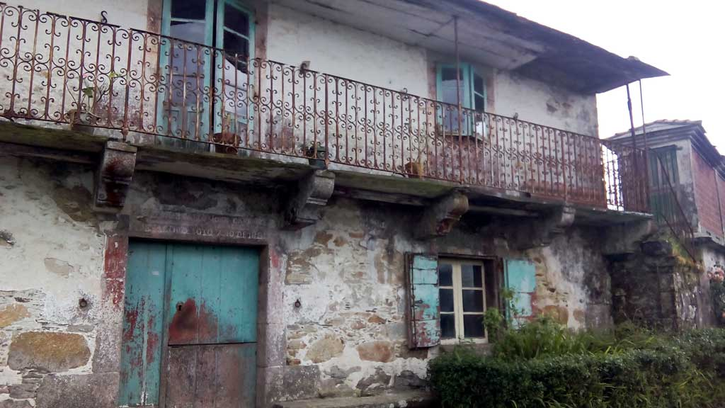 Casa en Lavandeira 1881, Cabanas.